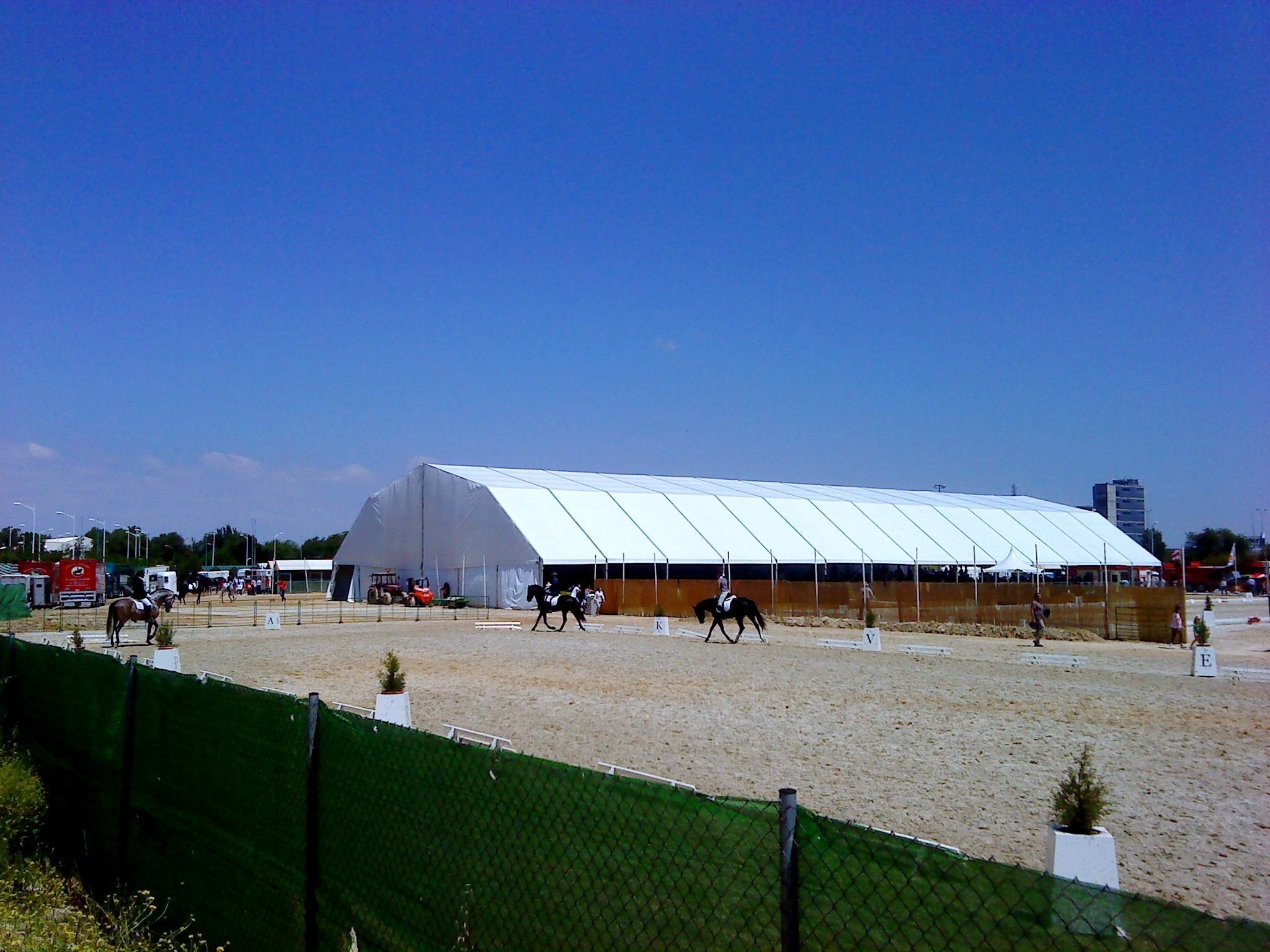 Zona ecuestre acondicionada para la celebración de la feria agrícola y ganadera de Castilla-La Mancha (Expovicaman) en Albacete